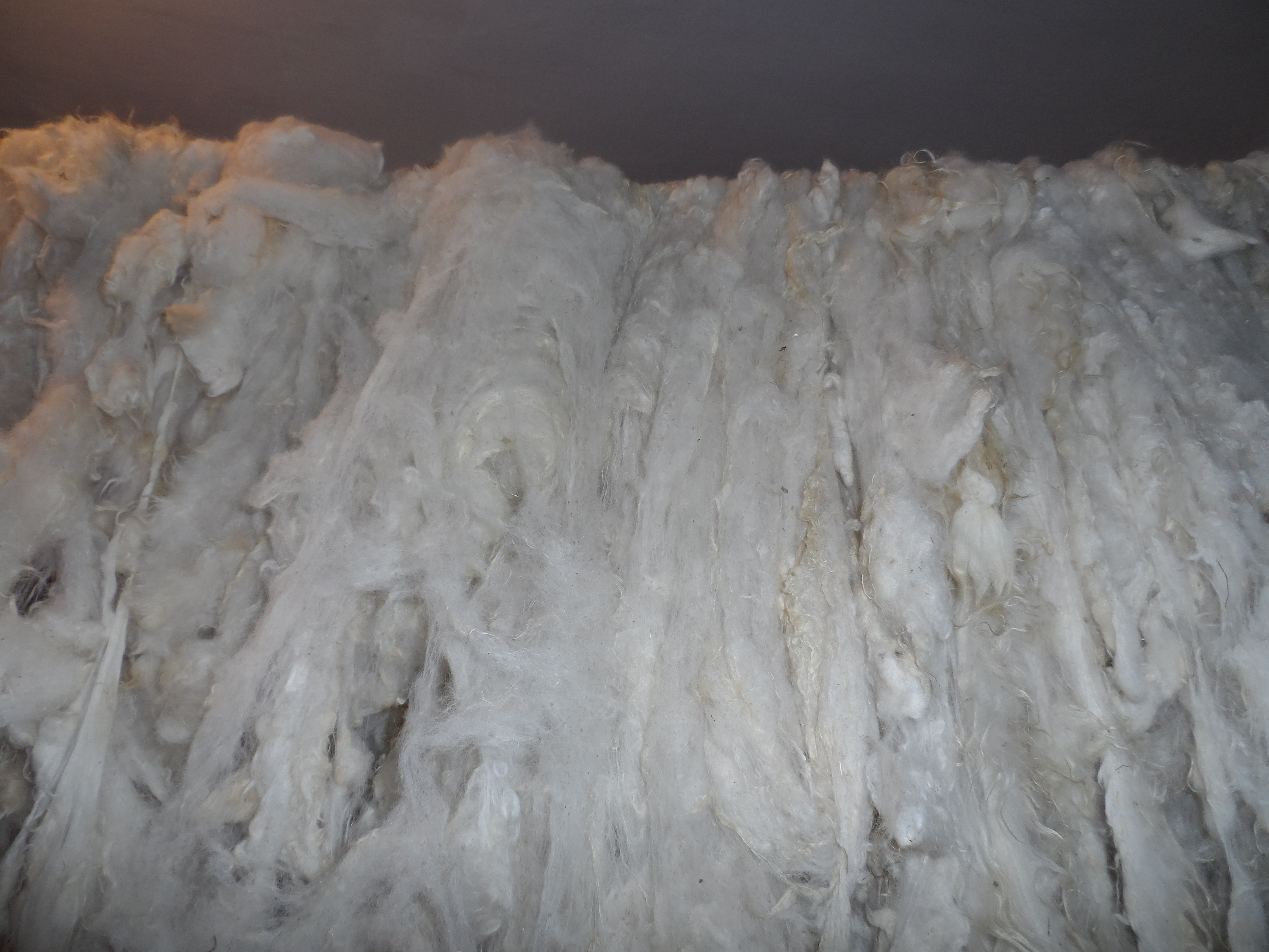 Yuyulub qurudulmaq üçün asılmış yun.